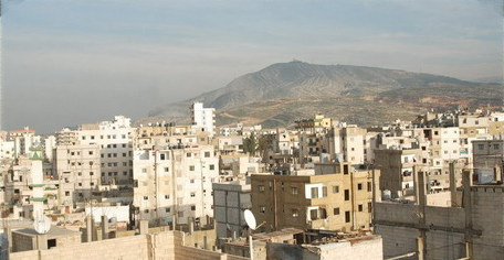 شبكة مخيم البداوي